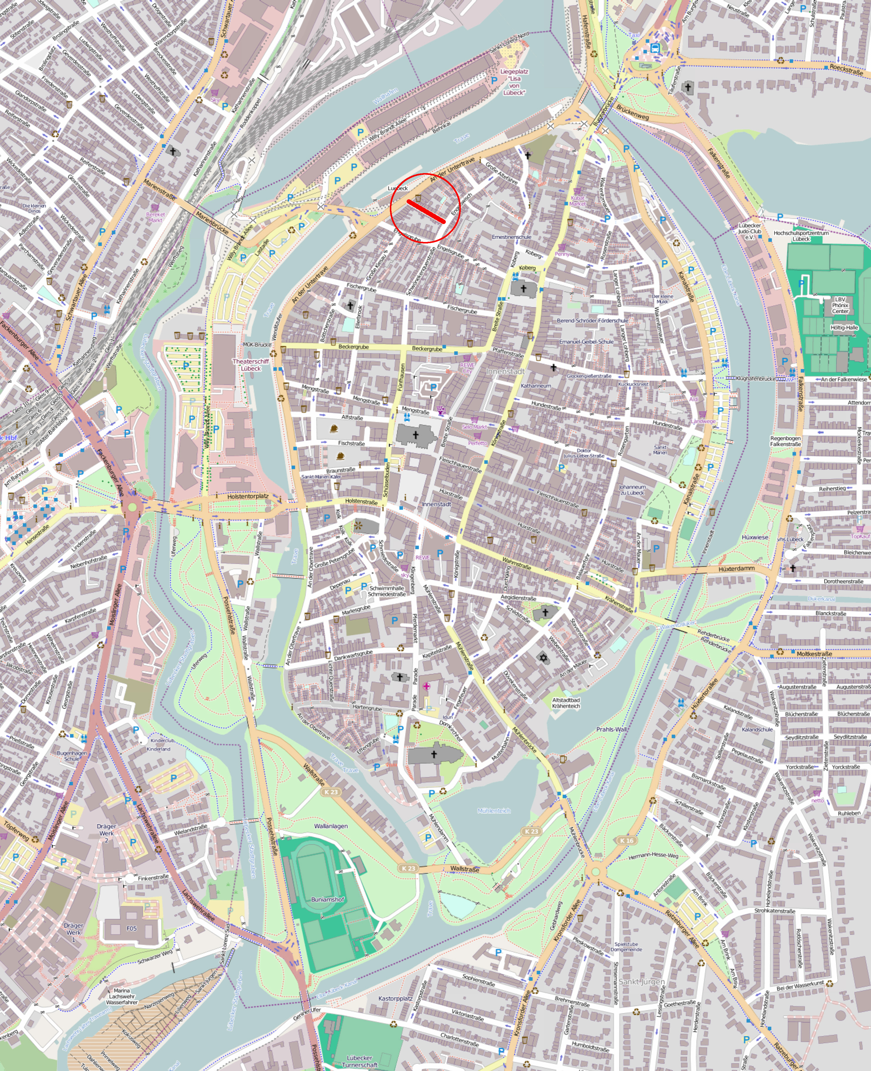 Die Alsheide in Lübeck, rot markiert auf einer OpenStreetMap-Karte